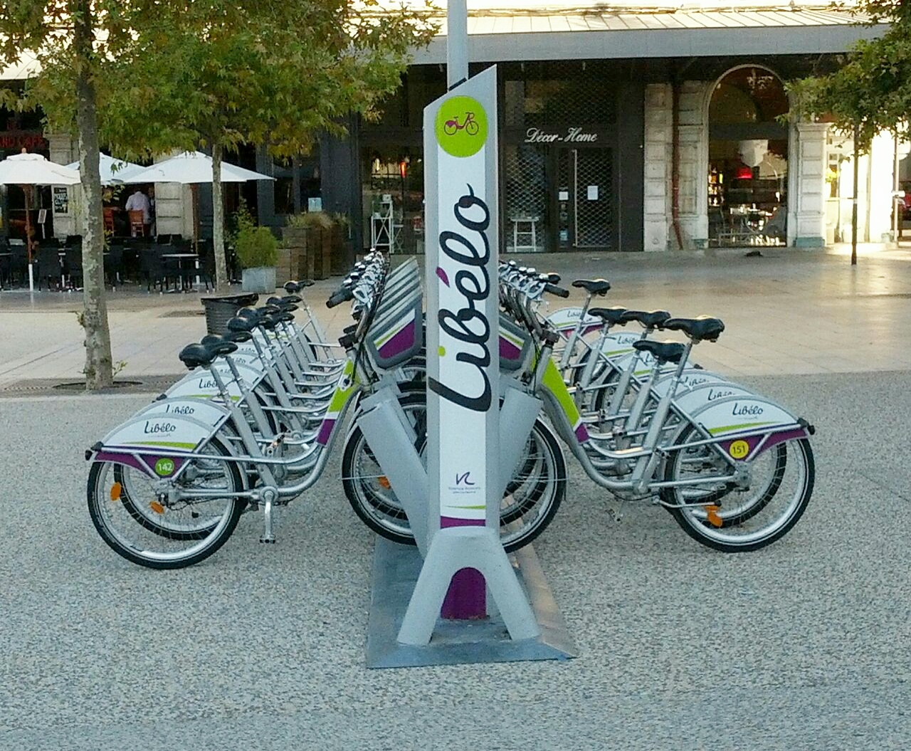 Vélos Libélo à la station Bancel à Valence.